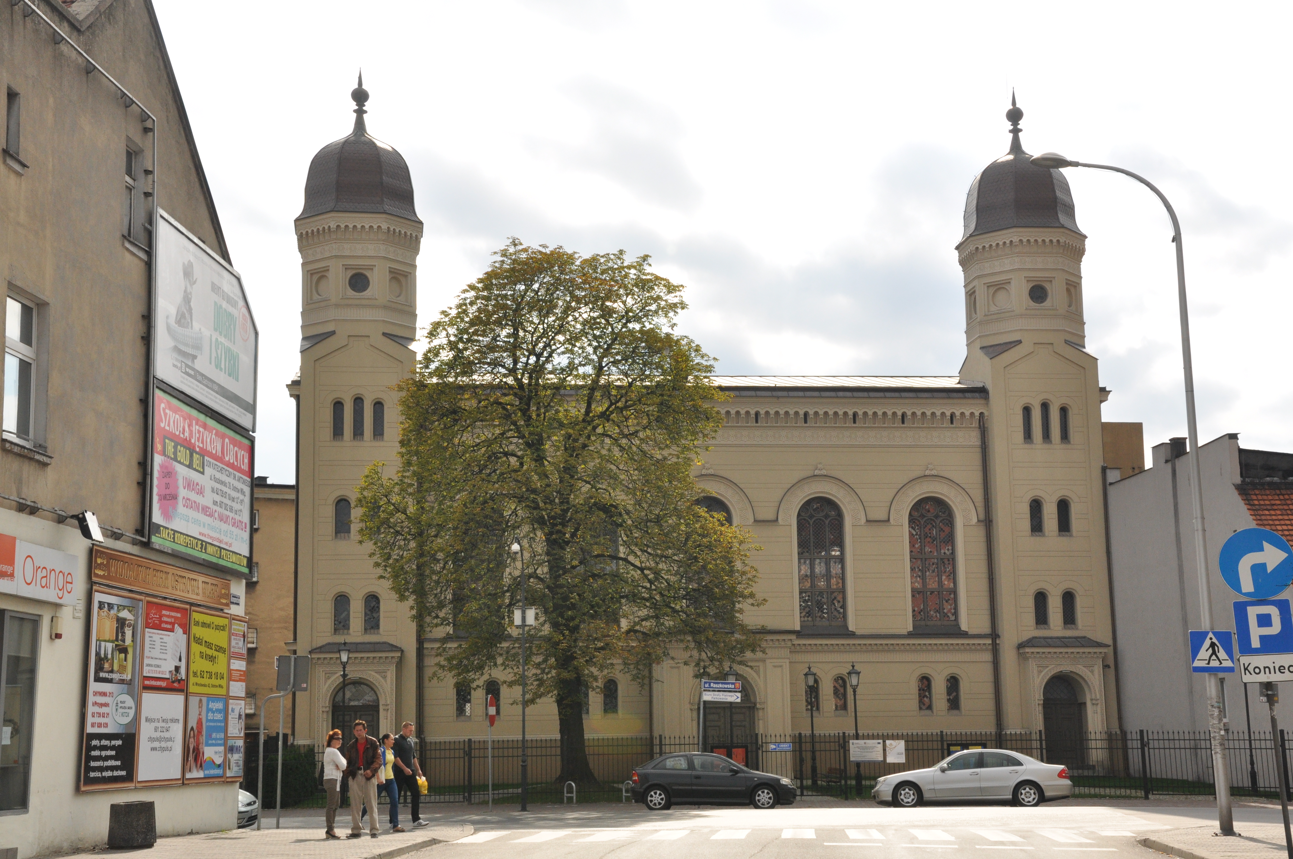 Ostrów Wielkopolski, ul. Raszkowska - synagoga z lat 1857-1860 (zabytek nr 434/A)